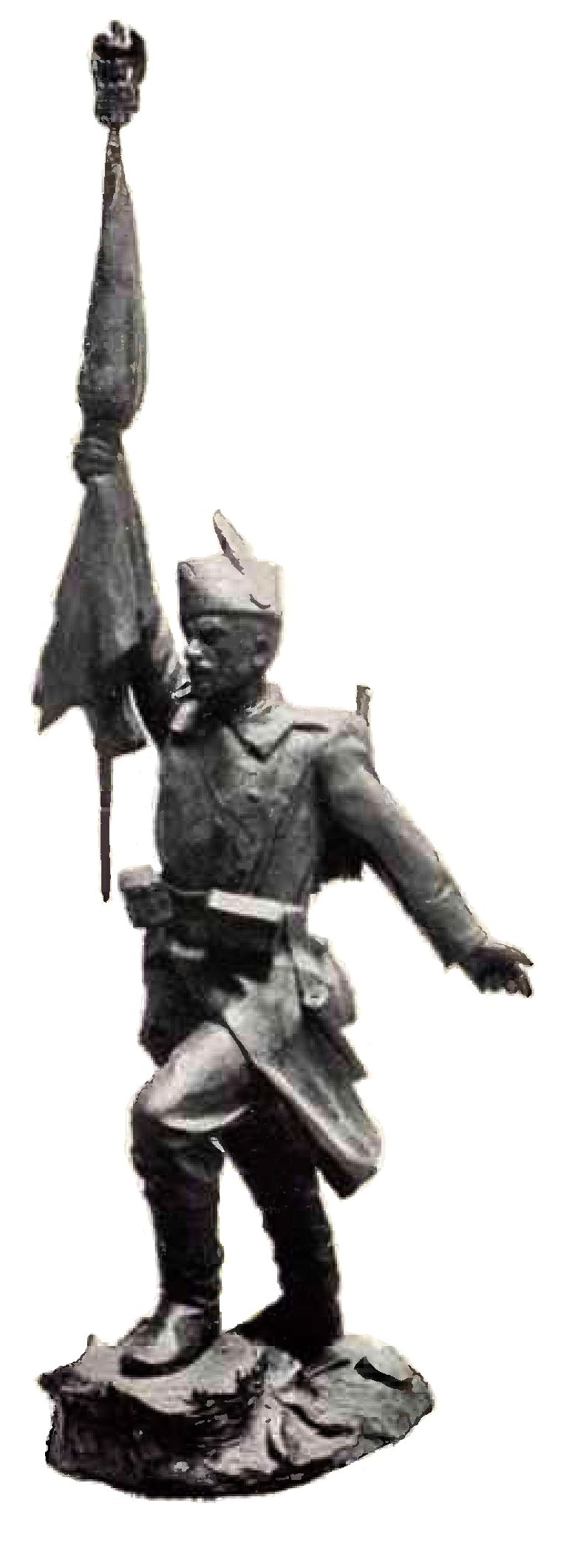 Dorobanț